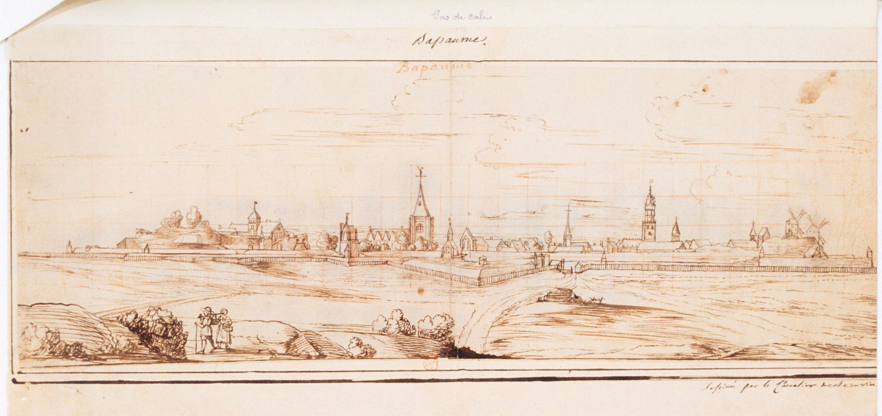 Vue générale de Bapaume sud au XVIIe siècle.